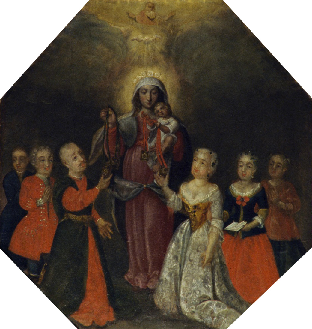 Беларуская (тарашкевіца): Групавы партрэт: Караль Станіслаў Радзівіл (Karal Stanisłaŭ Radzivił), ягоная жонка Ганна Кацярына Сангушка (Hanna Kaciaryna Sanguška), сын Міхал Казімер Радзівіл «Рыбанька» і дачка Кацярына Барбара Радзівіл